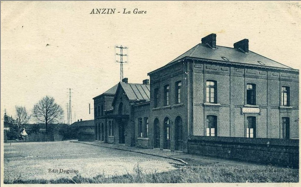 Carte postale ancienne éditée par Deguise : ANZIN - La gare La gare d'Anzin fut construite et exploitée par l'ancienne Compagnie des Mines d'Anzin